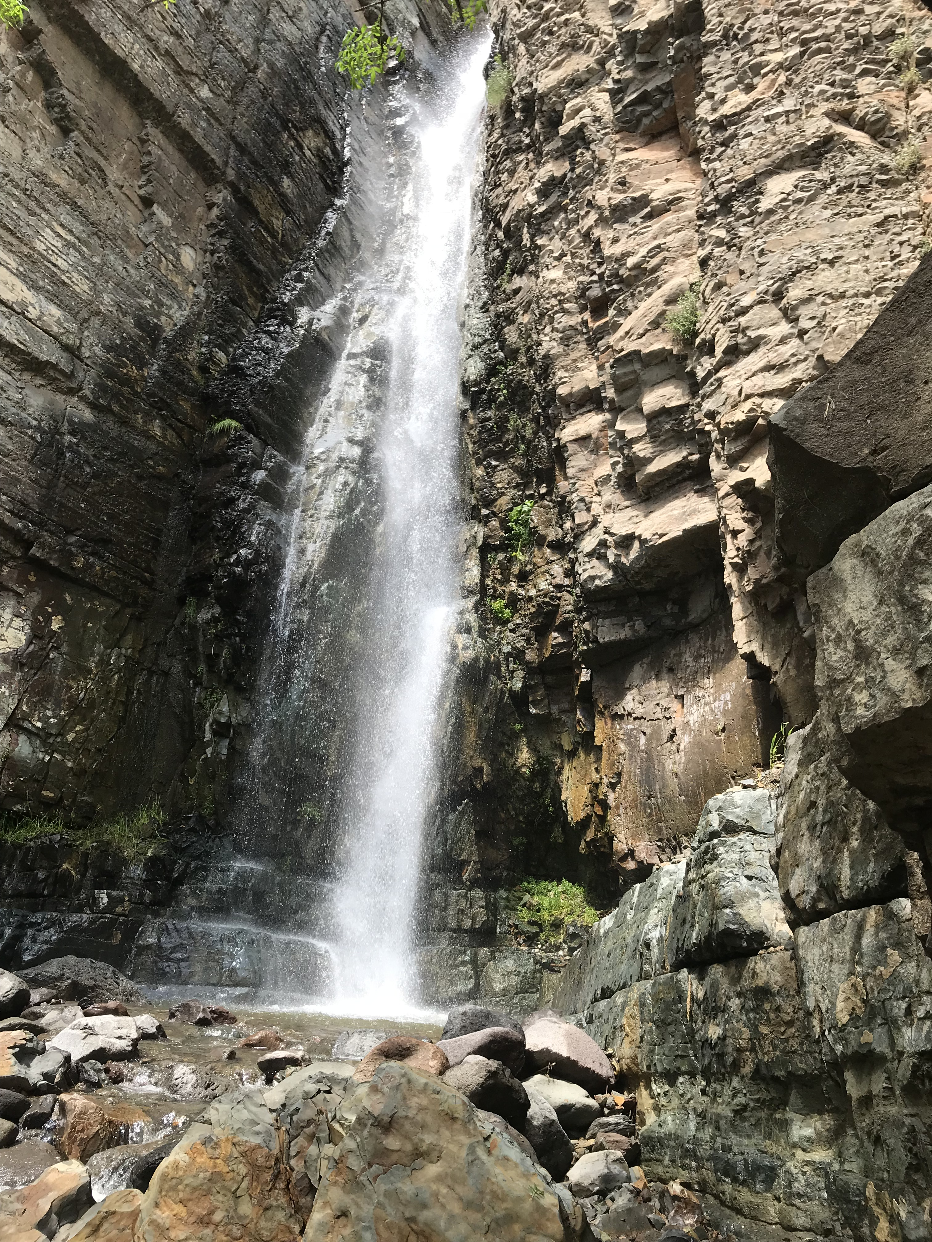 Գառնի